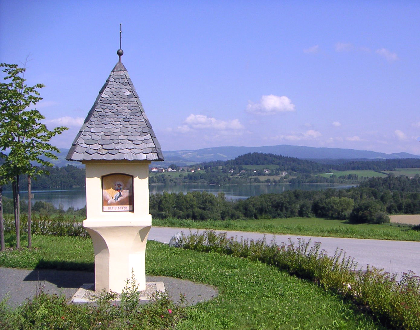 Bildstock, Sankt Georgen am Längsee in Kärnten (Anfang August 2005)